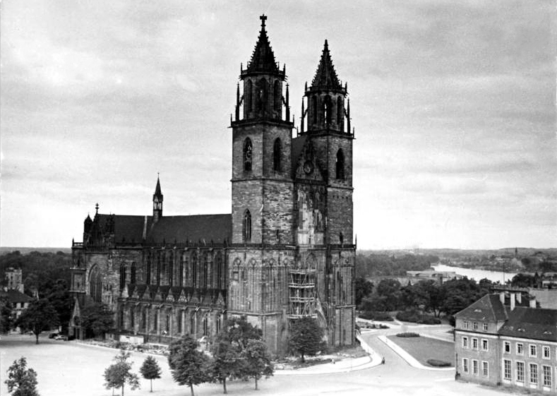 Zentralbild-Biscan Wjt-Ku 30.9.1954 Magdeburg rüstet zur Tausend-Jahr-Feier Bisher 1,3 Millionen DM für die Wiederherstellung des Magdeburger Doms ausgegeben. Der Magdeburger Dom, ein Meisterwerk gotischer Baukunst, wurde knapp vor Kriegsende von amerikanischen Sprengbomben und Artilleriegeschossen schwer beschädigt. Die Regierung der Deutschen Demokratischen Republik hat sich für die Instandsetzung dieses wertvollen Kulturdenkmals eingesetzt. Bisher wurden aus den Mitteln des Staatshaushaltes 1,3 Millionen DM für die Bauarbeiten am Dom ausgegeben. Auch im Haushaltsplan 1955 sind wieder 100.000 DM vorgesehen. Bis zur Tausendjahrfeier im nächsten Jahr wird die Wiederherstellung des Doms abgeschlossen. UBz, Der Dom zu Magdeburg in seinem heutigen Zustand nach Beseitigung der grössten Kriegsschäden. (Im Hintergrund rechts die Elbe).